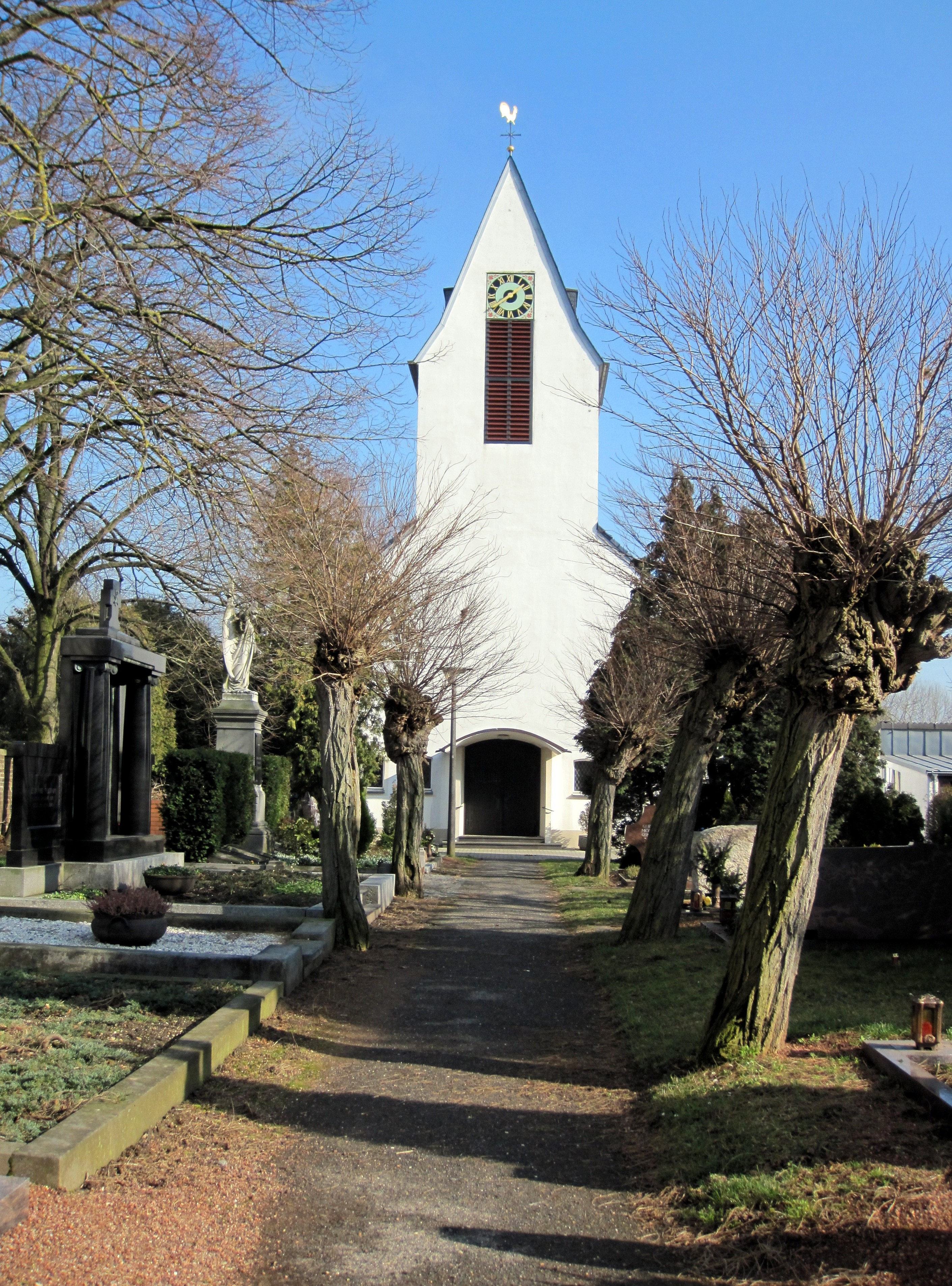 Sankt Clemens in Herrig Westfront, umgeben vom Friedhof